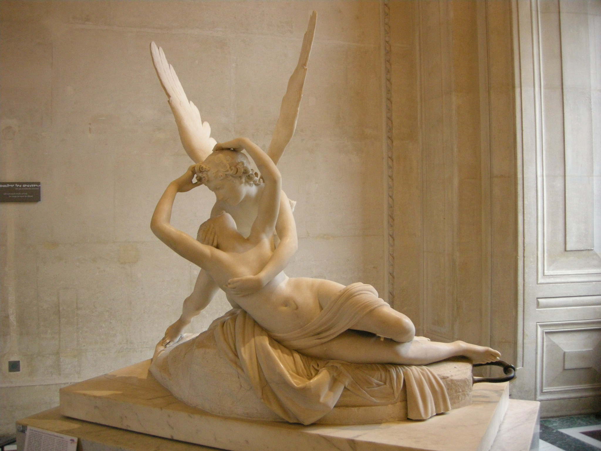 Antonio canova, amore e psiche louvre 02.JPG